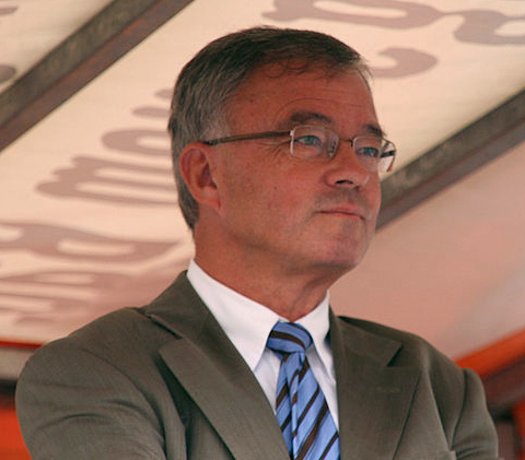 Rektor Arndt bei einer Demonstration von Studierenden der Universität Mannheim gegen die sogenannte Profilschärfung.